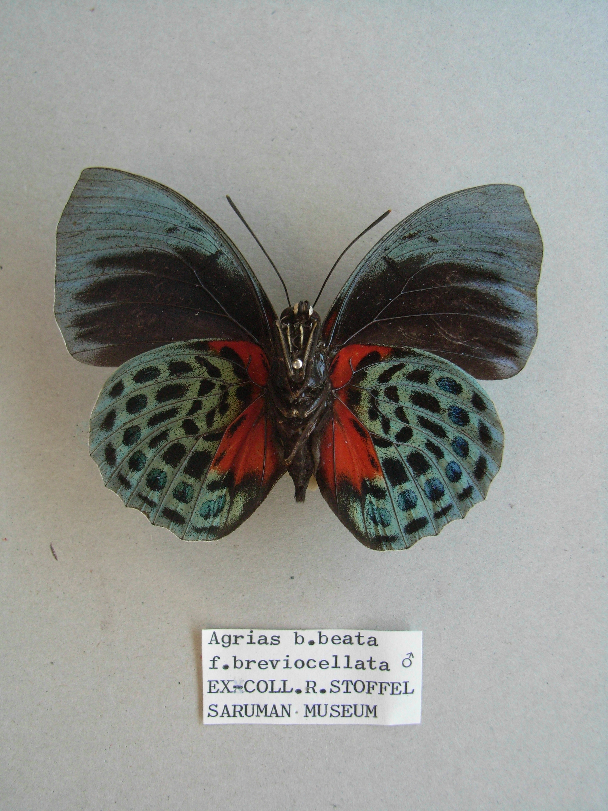 Agrias beata beata breviocellata